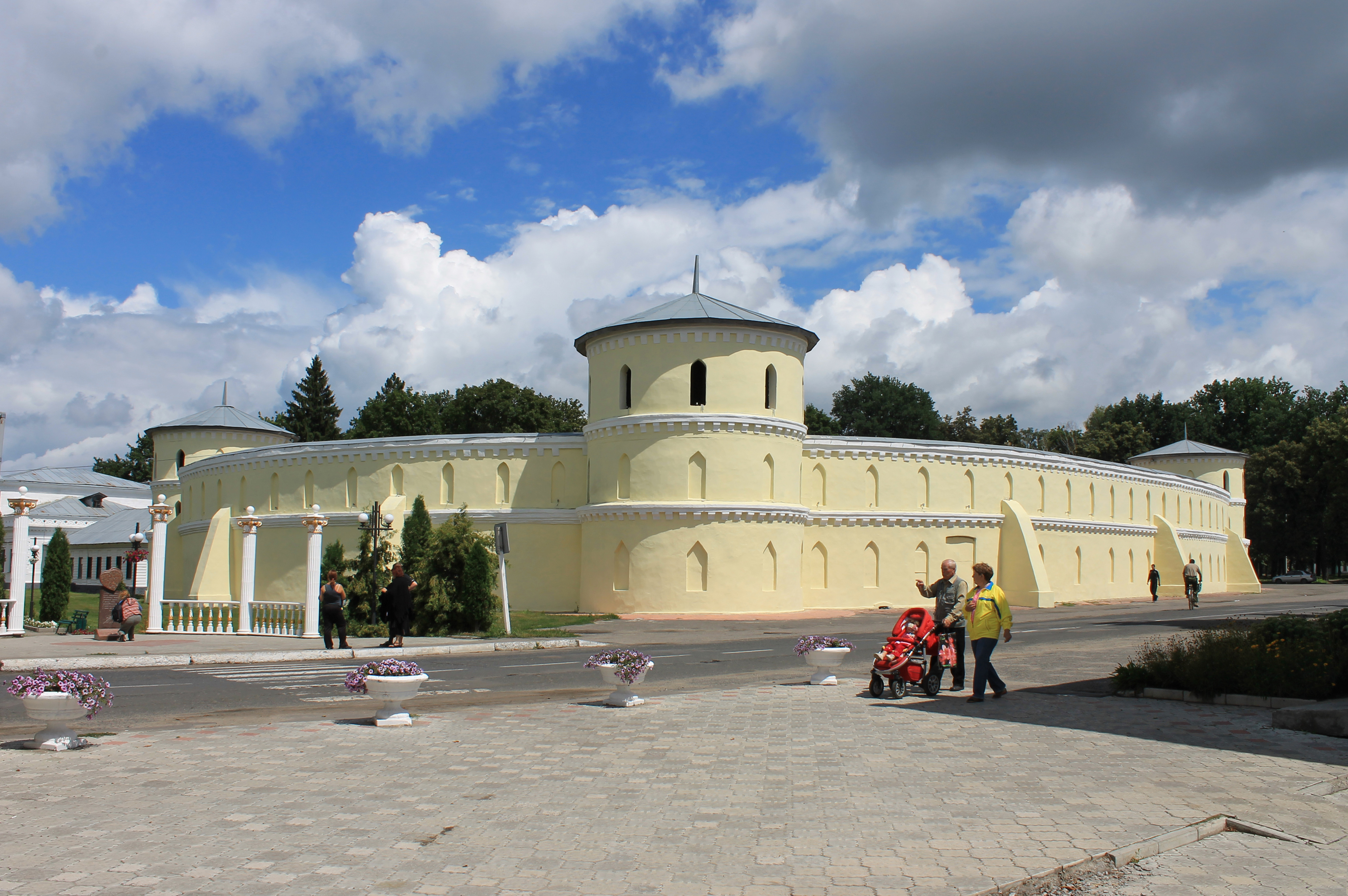 Круглий двір, вул. Миру,16, м.Тростянець